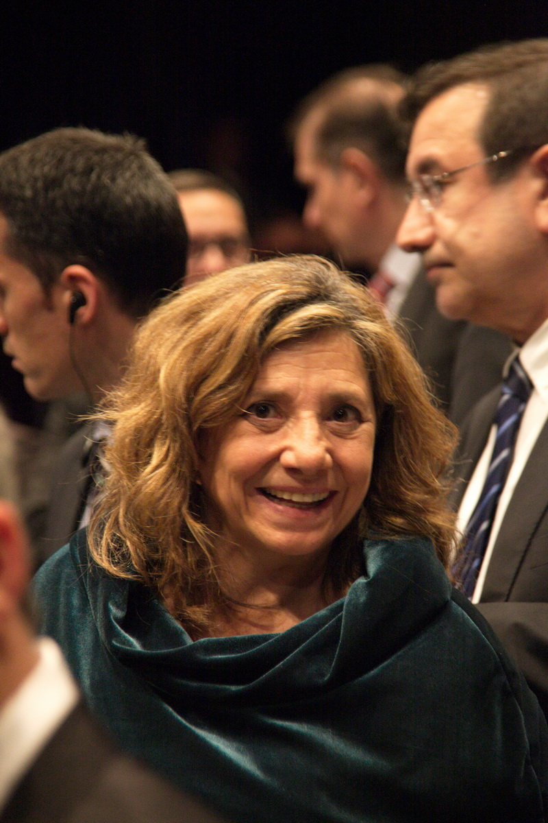 Lliurament dels Premis Nacionals de Cultura de Catalunya 2014. Santa Coloma de Gramenet, 2 de juny de 2014